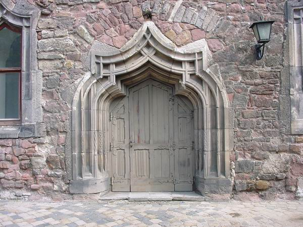 Halle Moritzburg, eigenes Foto von 2004, public domain Mewes, Tür im Nordflügel.